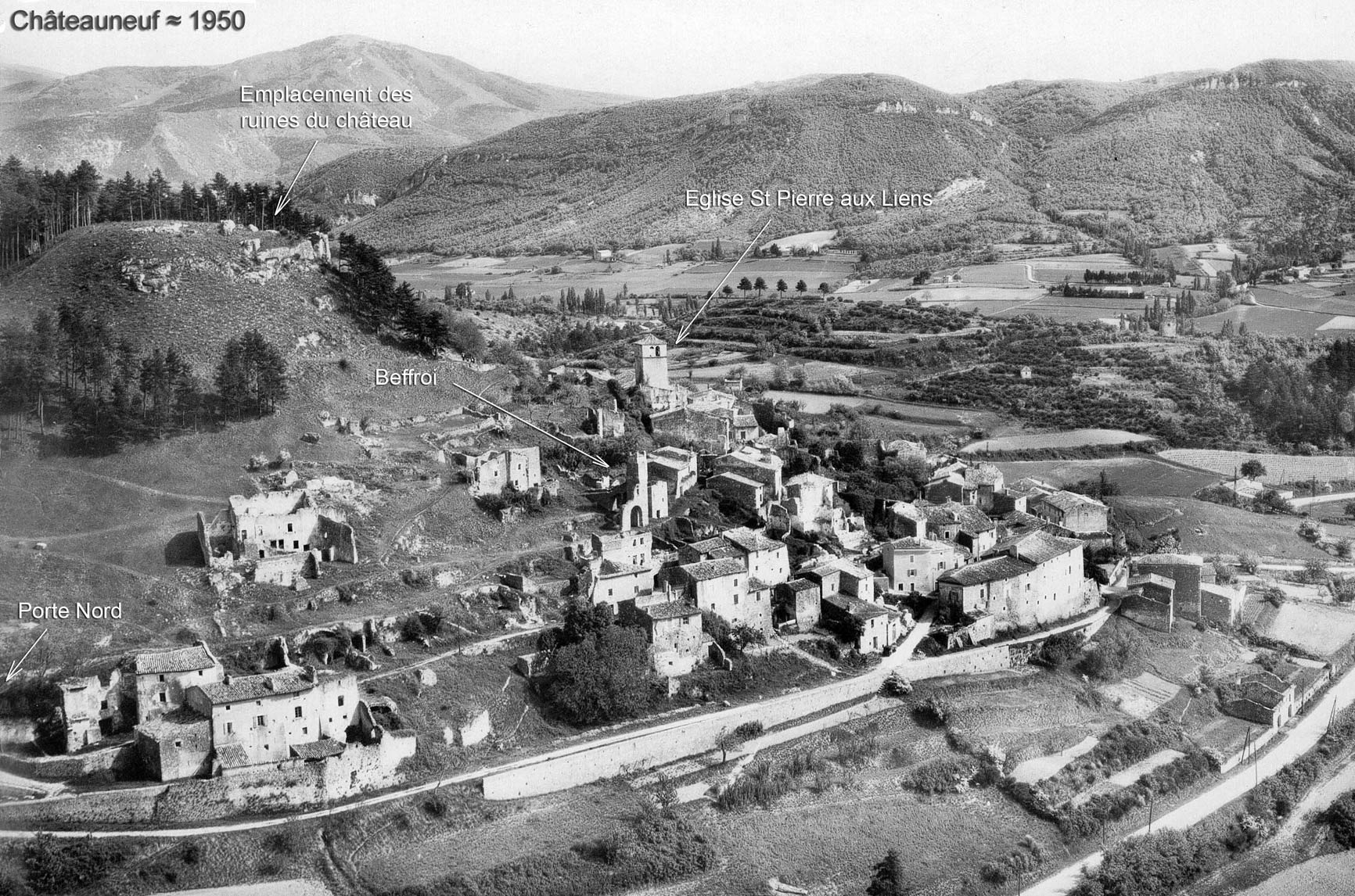 Vue aérienne du village de Châteauneuf de Mazenc en 1950...